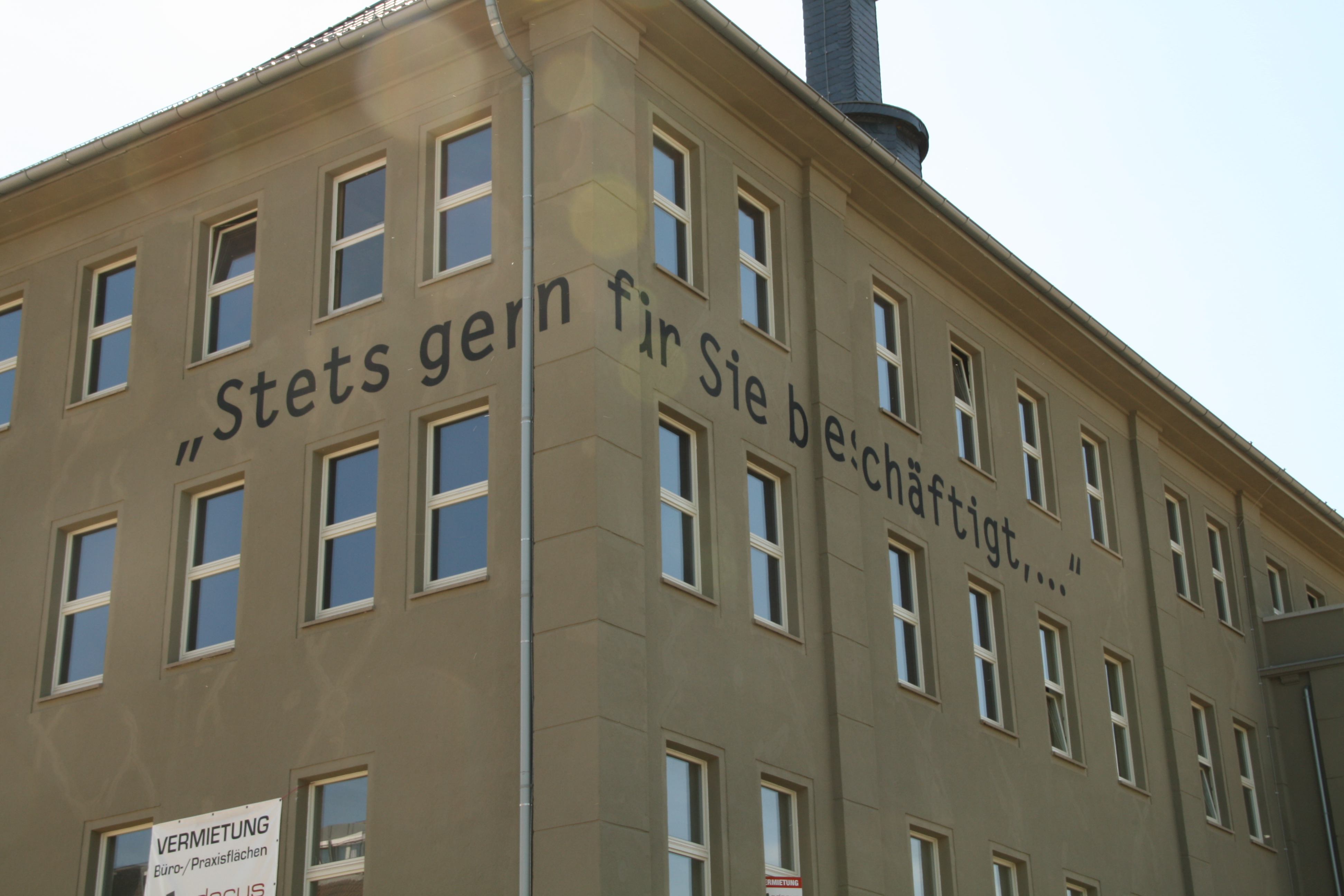 Es handelt sich um die Außenansicht der Gedenkstätte der Firma Topf und Söhne in Erfurt. Zu erkennen ist der Schriftzug "Stets gern für Sie beschäftigt, ...", der in den Angeboten und Auftragsbestätigungen der Firma zur NS-Zeit zu finden war.